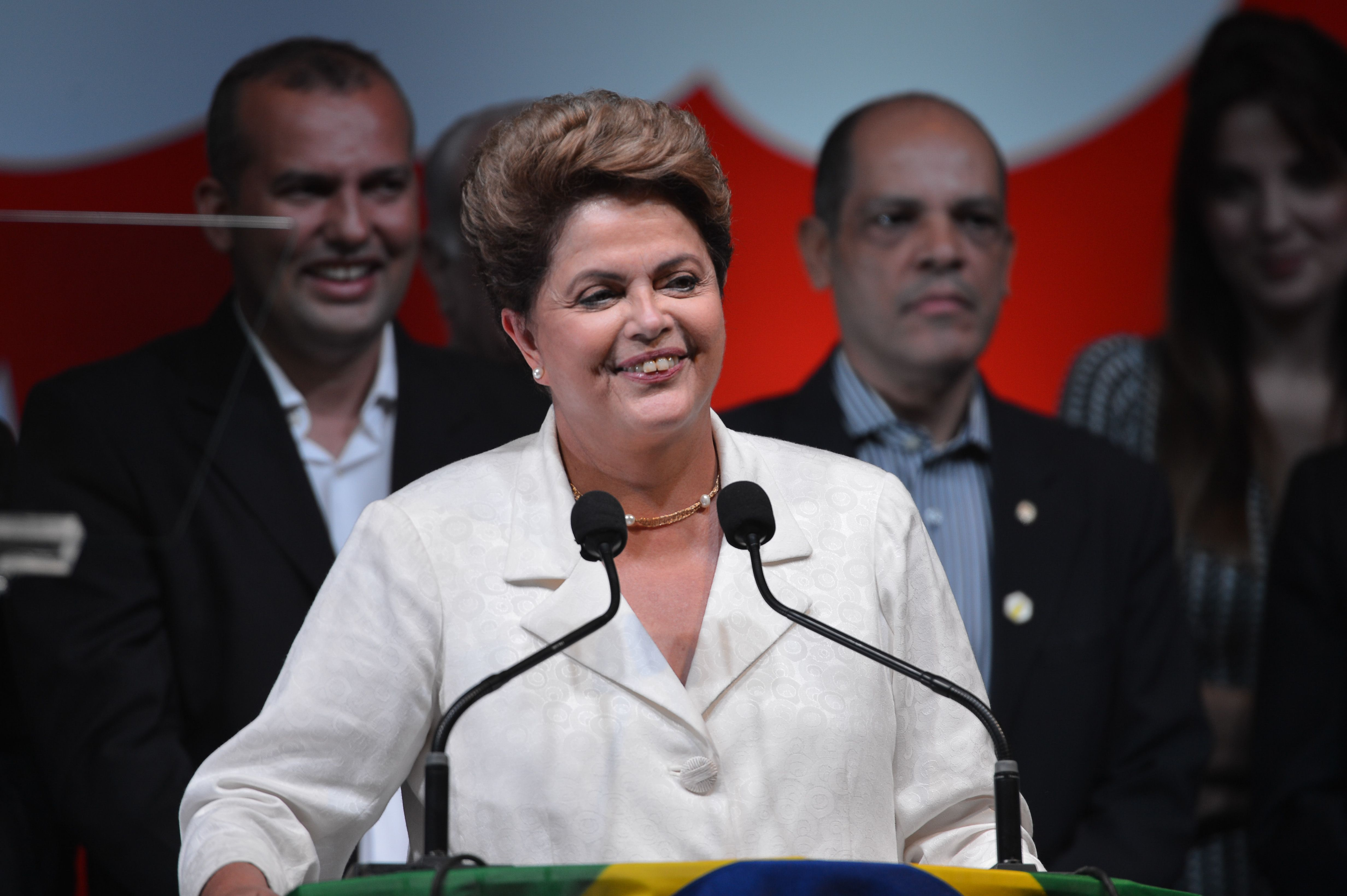 Brasília - Presidenta reeleita, Dilma Rousseff, faz pronunciamento durante evento em hotel em Brasília.